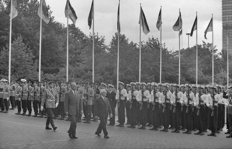 Bonn, Besuch Erich Honecker ADN-ZB BRD: Honecker-Besuch Der Generalsekretär des ZK und der SED und Vorsitzende des Staatsrates der DDR, Erich Honecker, traf zu einem offiziellen Besuch in der BRD ein. Vor dem Bundeskanzleramt in Bonn schritt Erich Honecker gemeinsam mit Bundeskanzler Helmut Kohl eine Ehrenformation des Wachbataillons der Bundeswehr ab. Abgebildete Personen: Honecker, Erich: Staatsratsvorsitzender, Generalsekretär des ZK der SED, DDR (GND 118553399) Kohl, Helmut: Bundeskanzler, Ministerpräsident von Rheinland-Pfalz, CDU, Bundesrepublik Deutschland (GND 118564595)